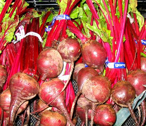 Beets at Kroger.